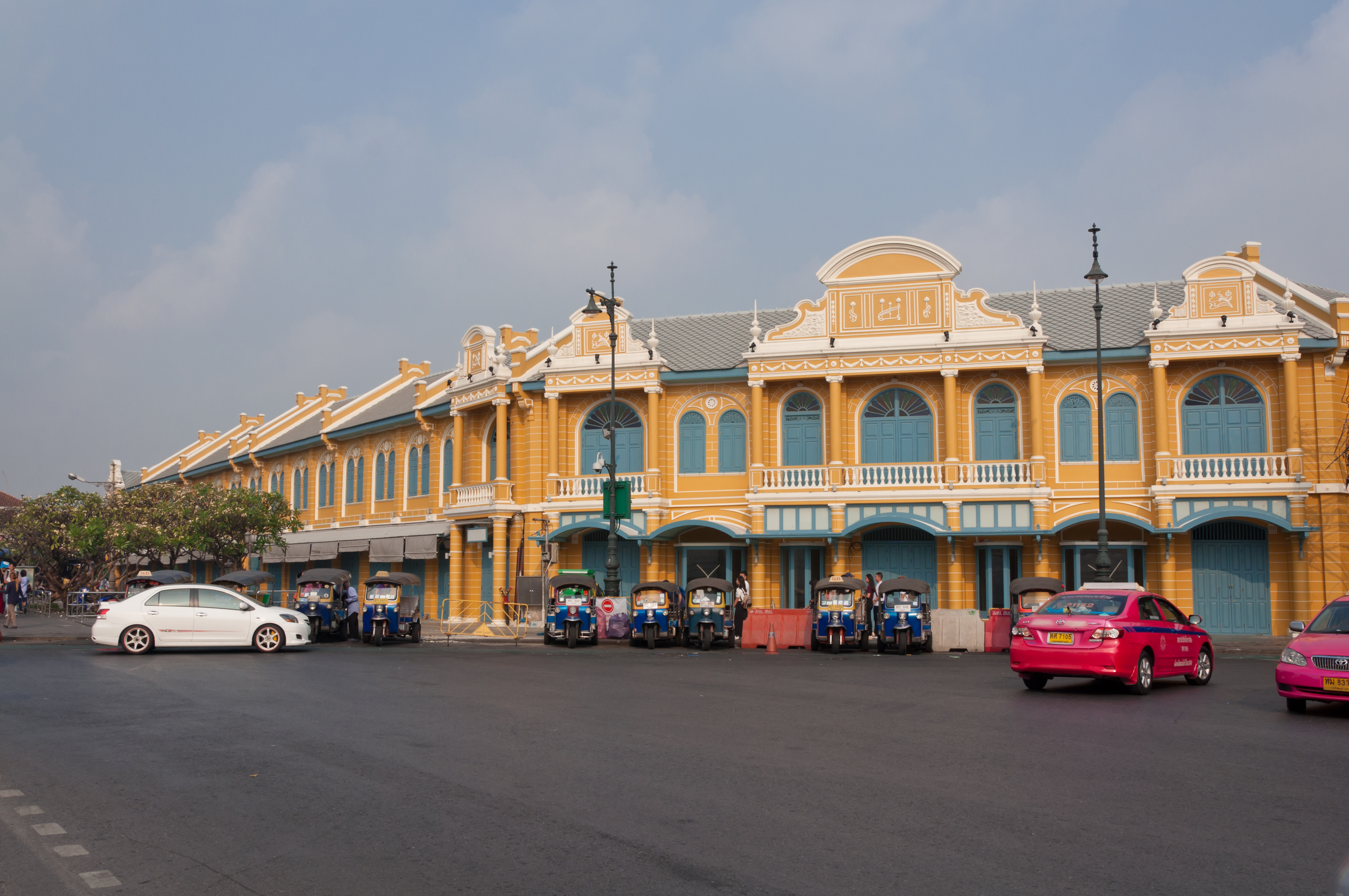 トゥクトゥク